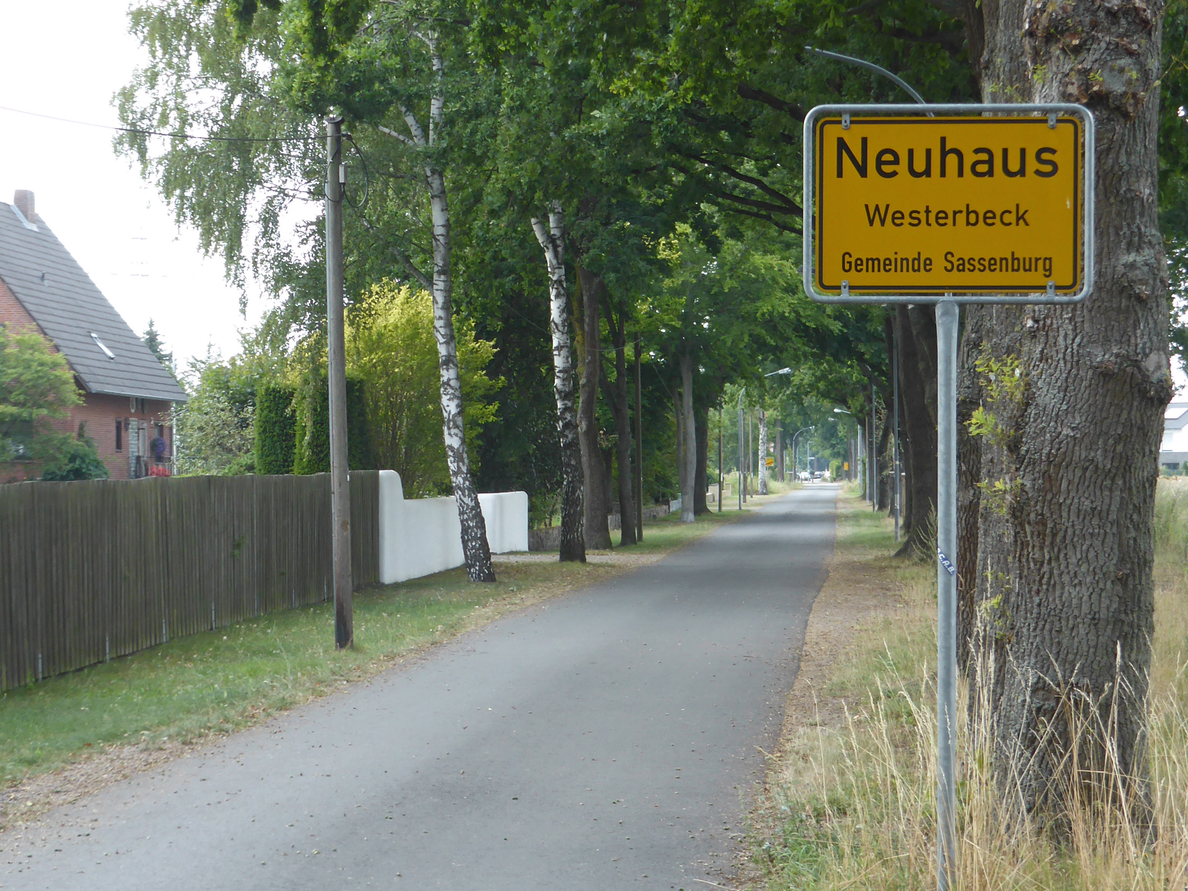 Ortseingang der Siedlung von Neuhaus.